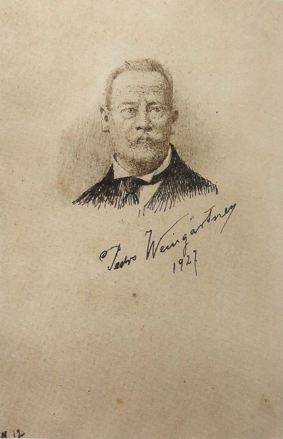 Auto-retrato com assinatura, grafite e naquim